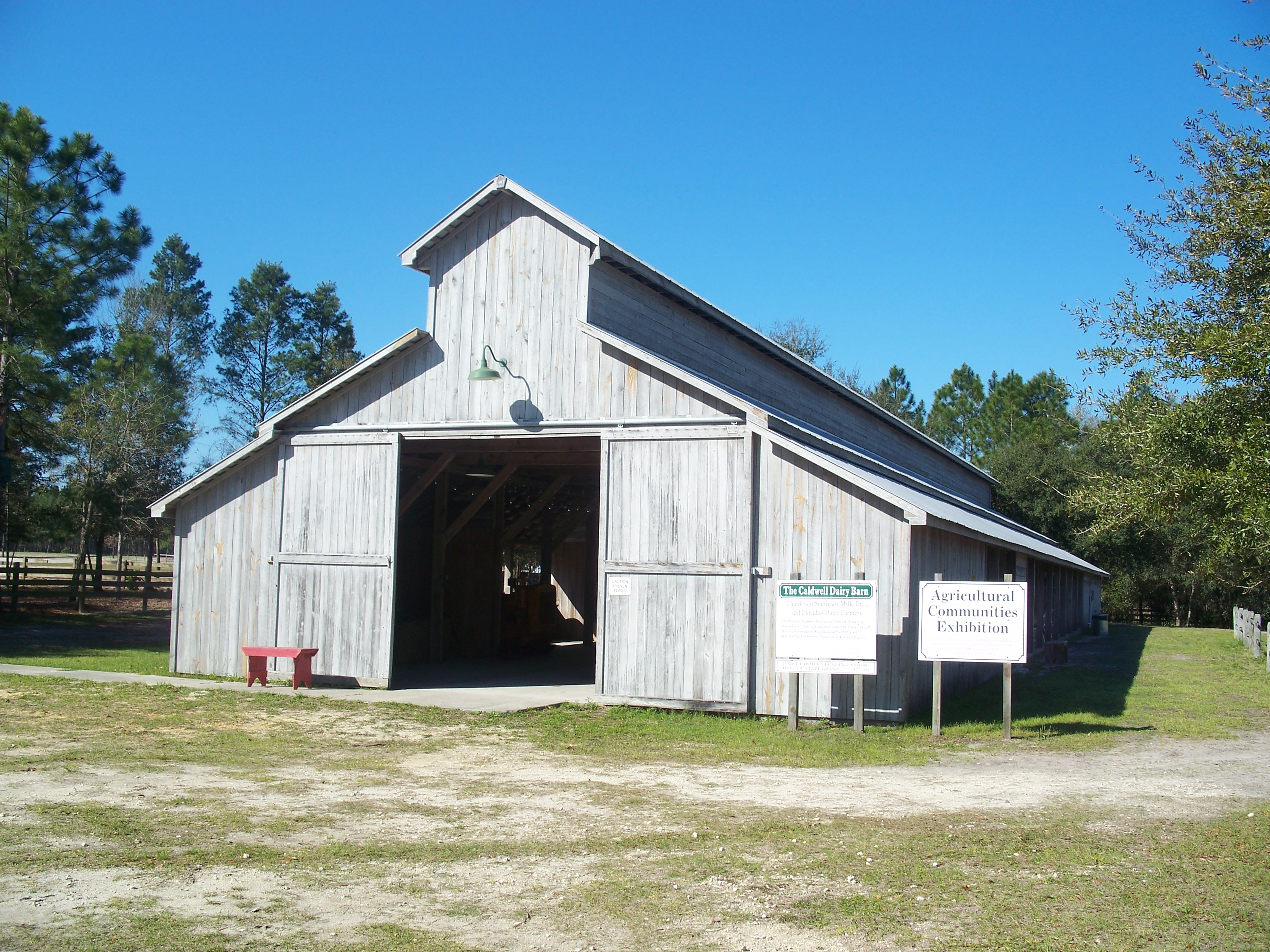 Palm Coast, Florida: Florida Agricultural Museum: Caldwell Dairy Barn